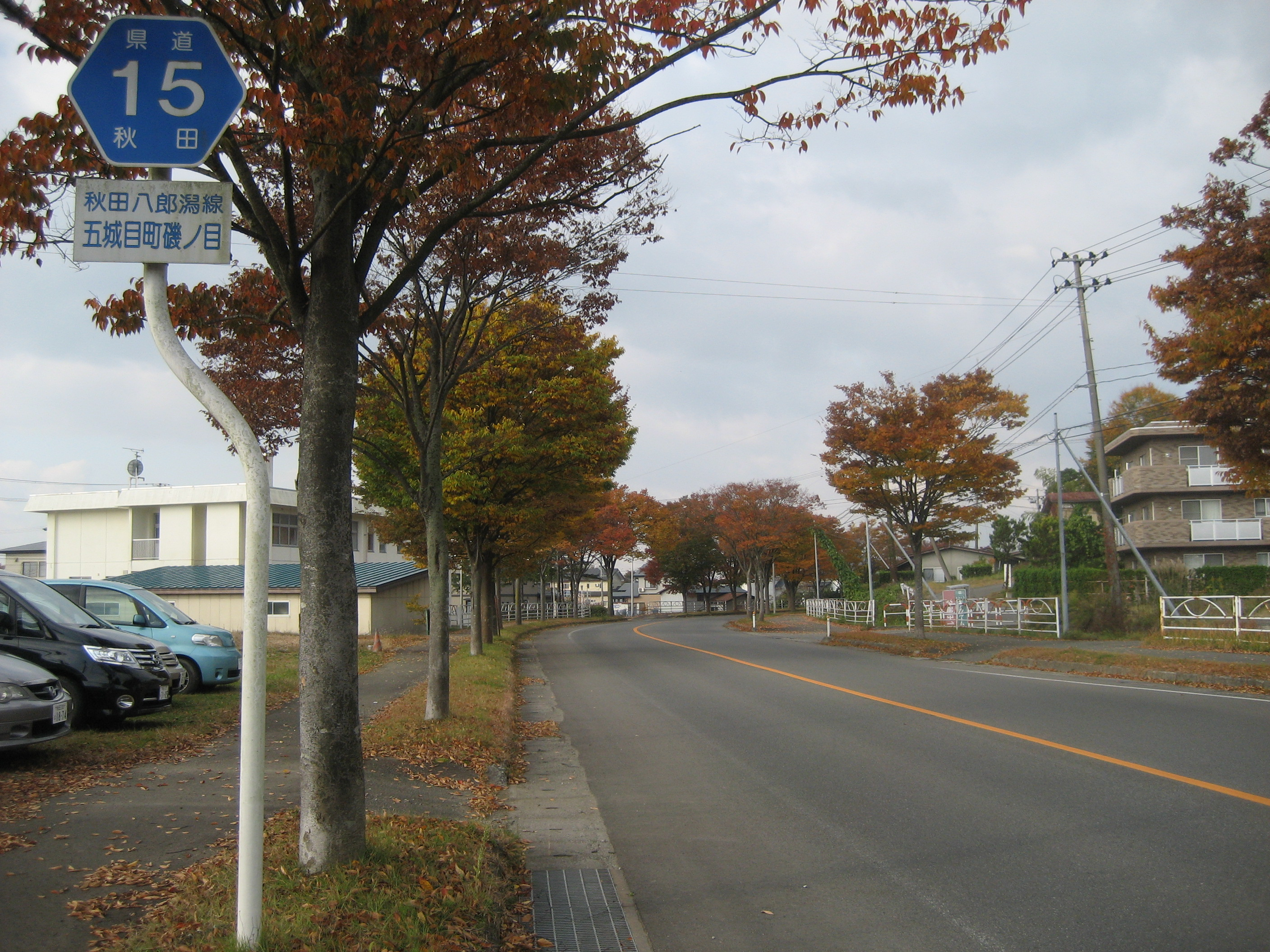 秋田県道15号線五城目町磯ノ目付近